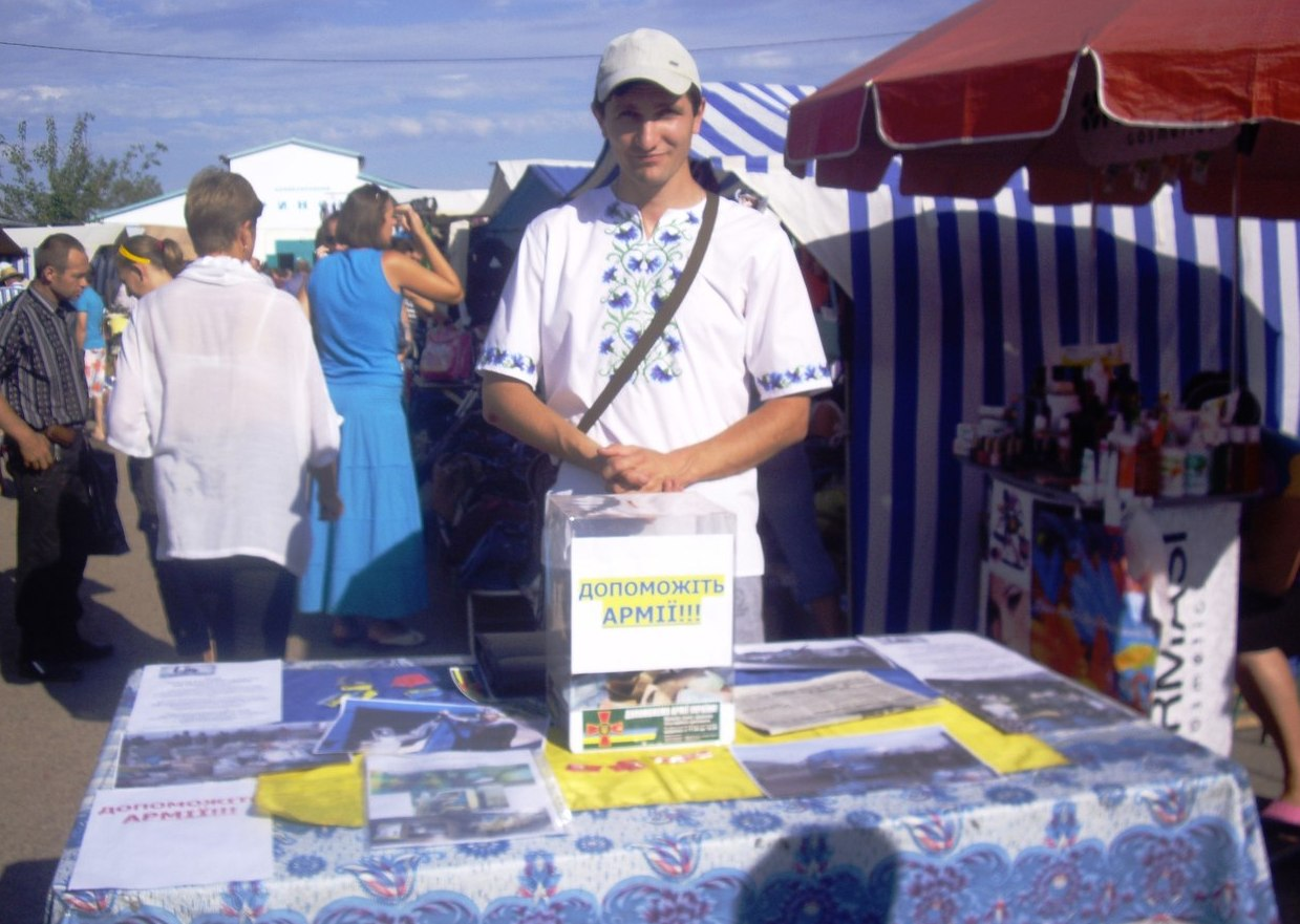 Сергій Сіваченко, окрім іншої допомоги українській армії, у 2014-17 рр. щонеділі збирав пожертви від громадян на ринку у Хорошеві